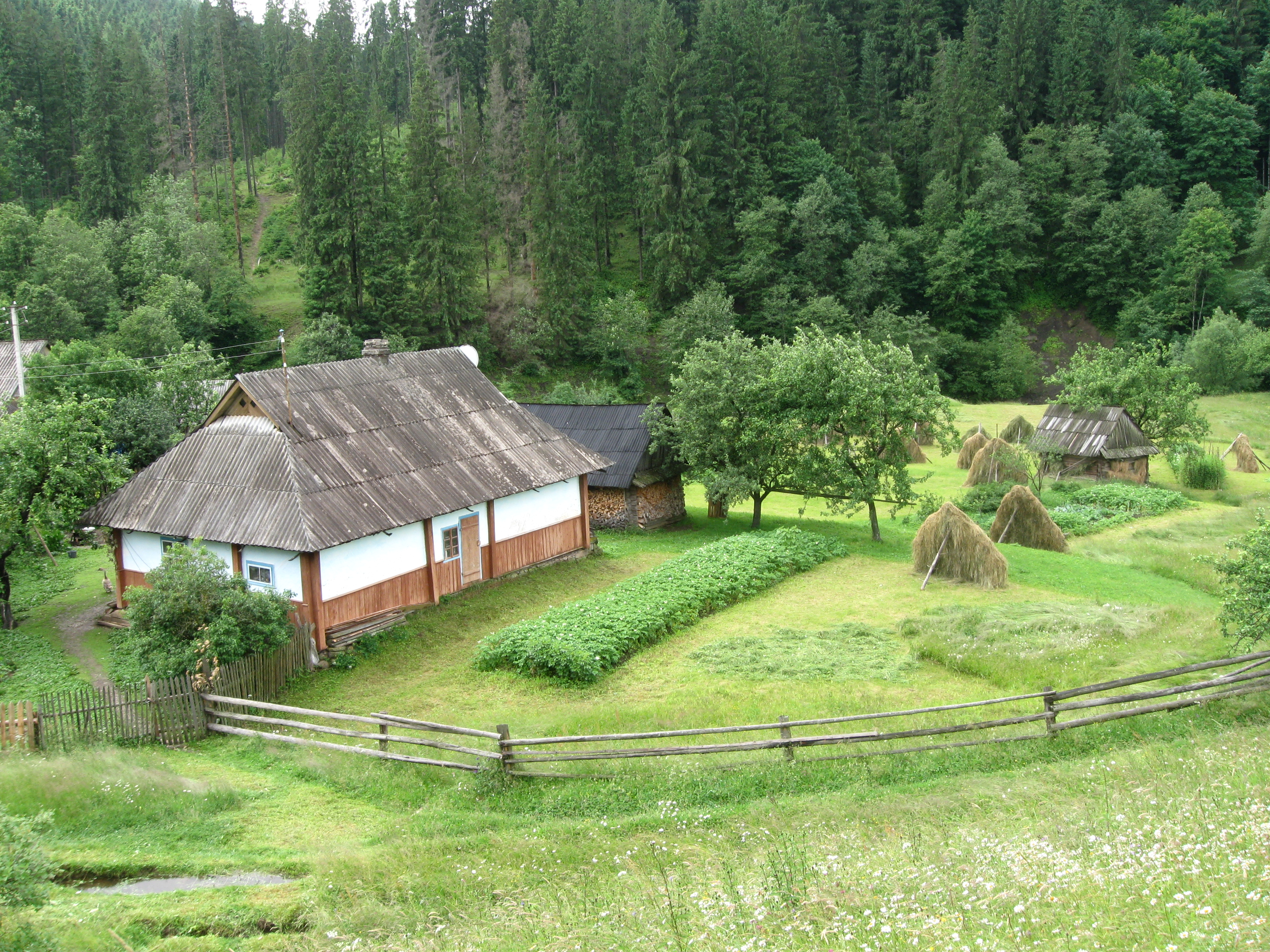 «Ґорґани», Надвірнянський район, Бистрицька та Зеленська сільські ради